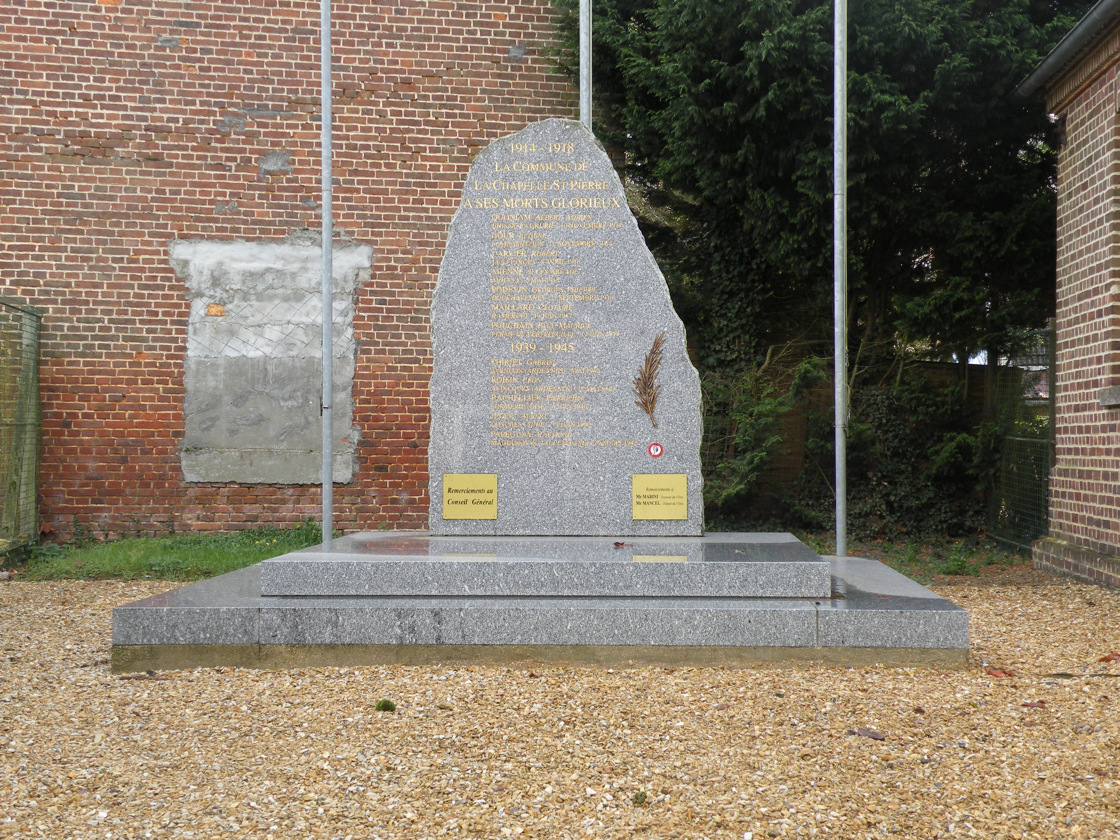 Lachapelle-Saint-Pierre monuments aux morts